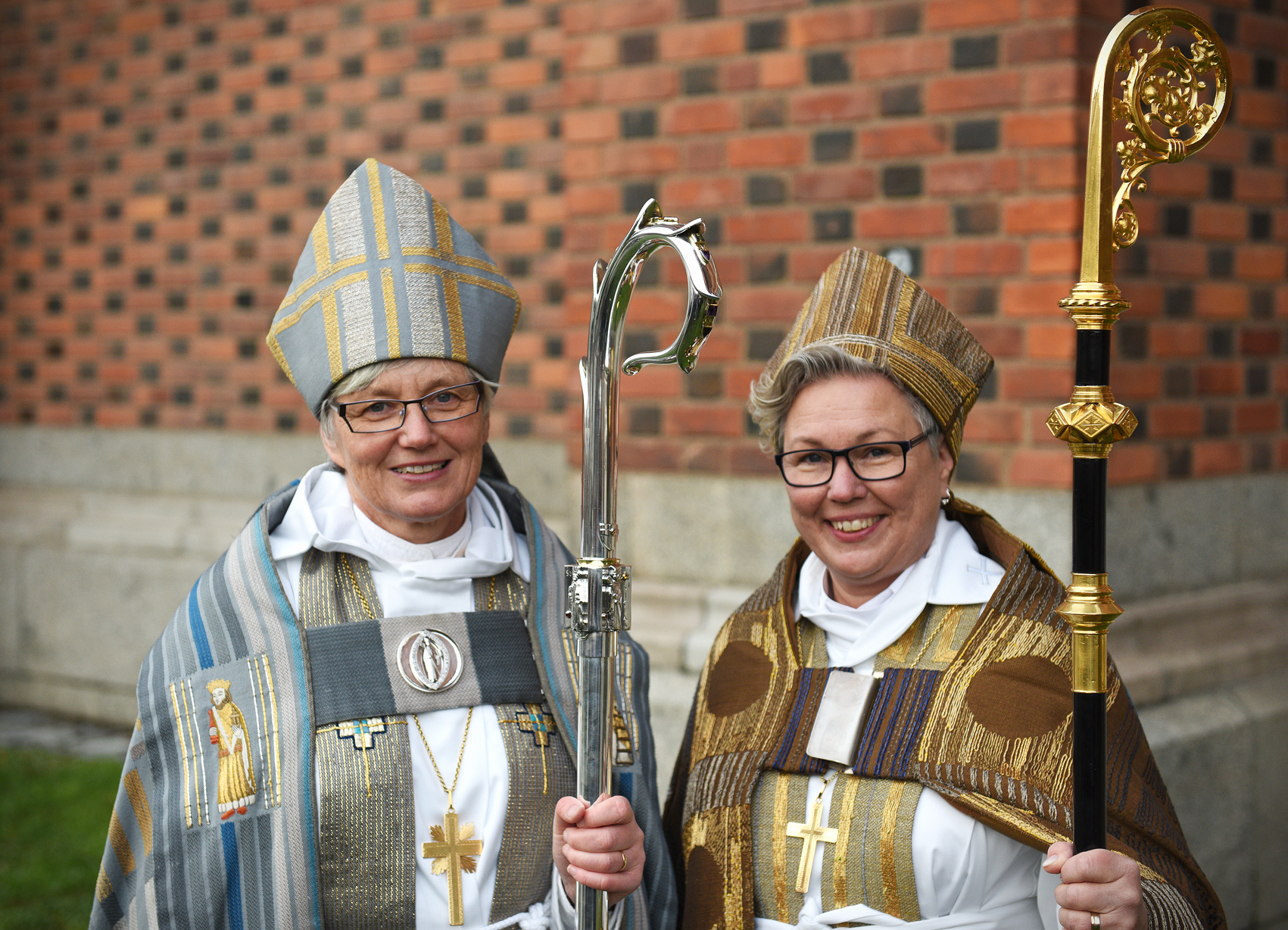 Ärkebiskop Antje Jackelén (t.v.) och Svenska kyrkans nya biskop i Härnösands stift, Eva Nordung Byström. Biskopsvigningen ägde rum i Uppsala domkyrka på tredje söndagen i Advent, den 14 december 2014.